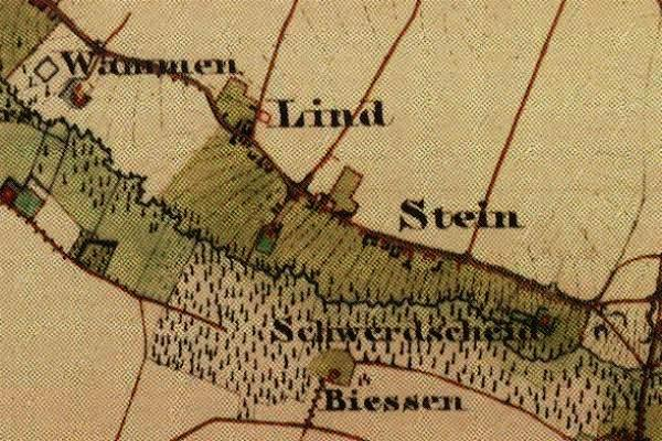 Preußische Kartenaufnahme 1846 - Uraufnahme